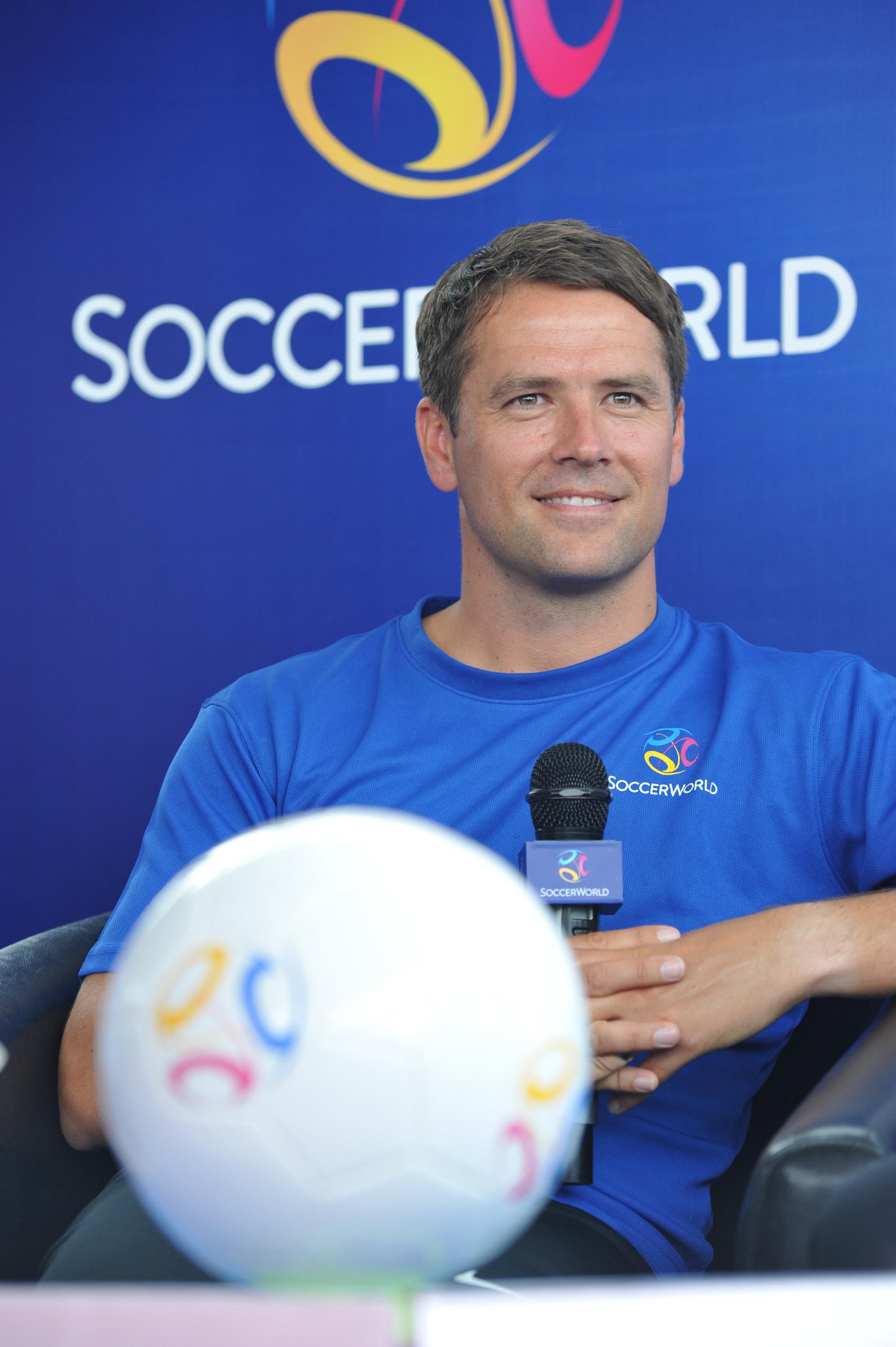 欧文 (2013)